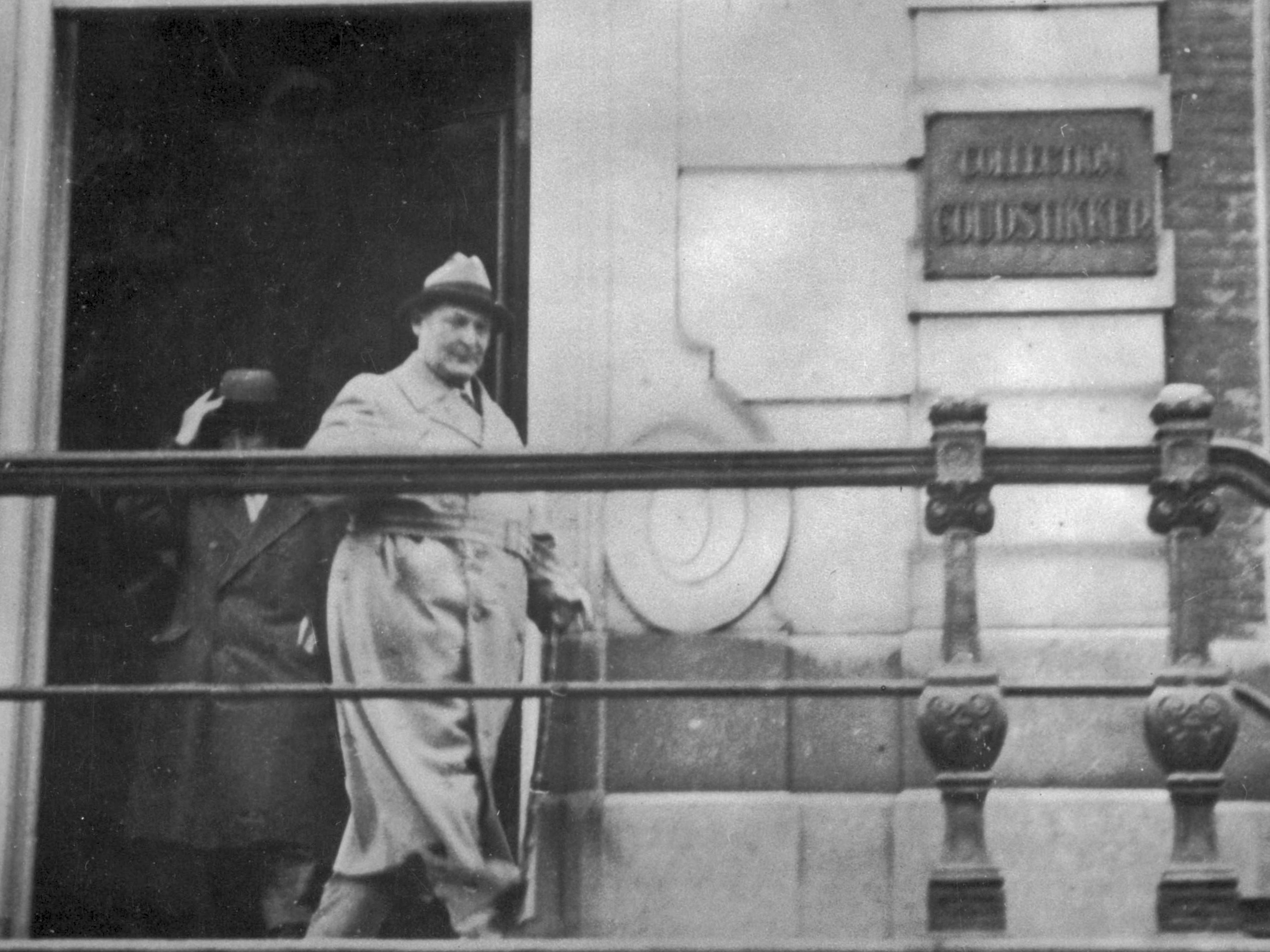 Hermann Goering verlaat het pand van de kunsthandel Goudstikker aan de Herengracht 458, Amsterdam 1941